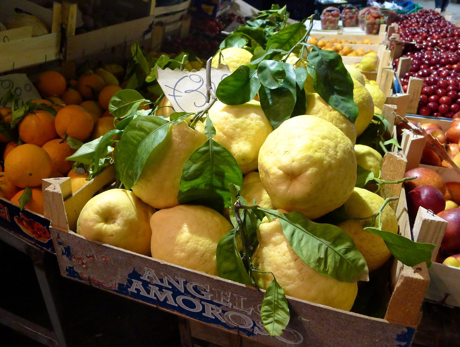 Limone di Sorrento - Italia.